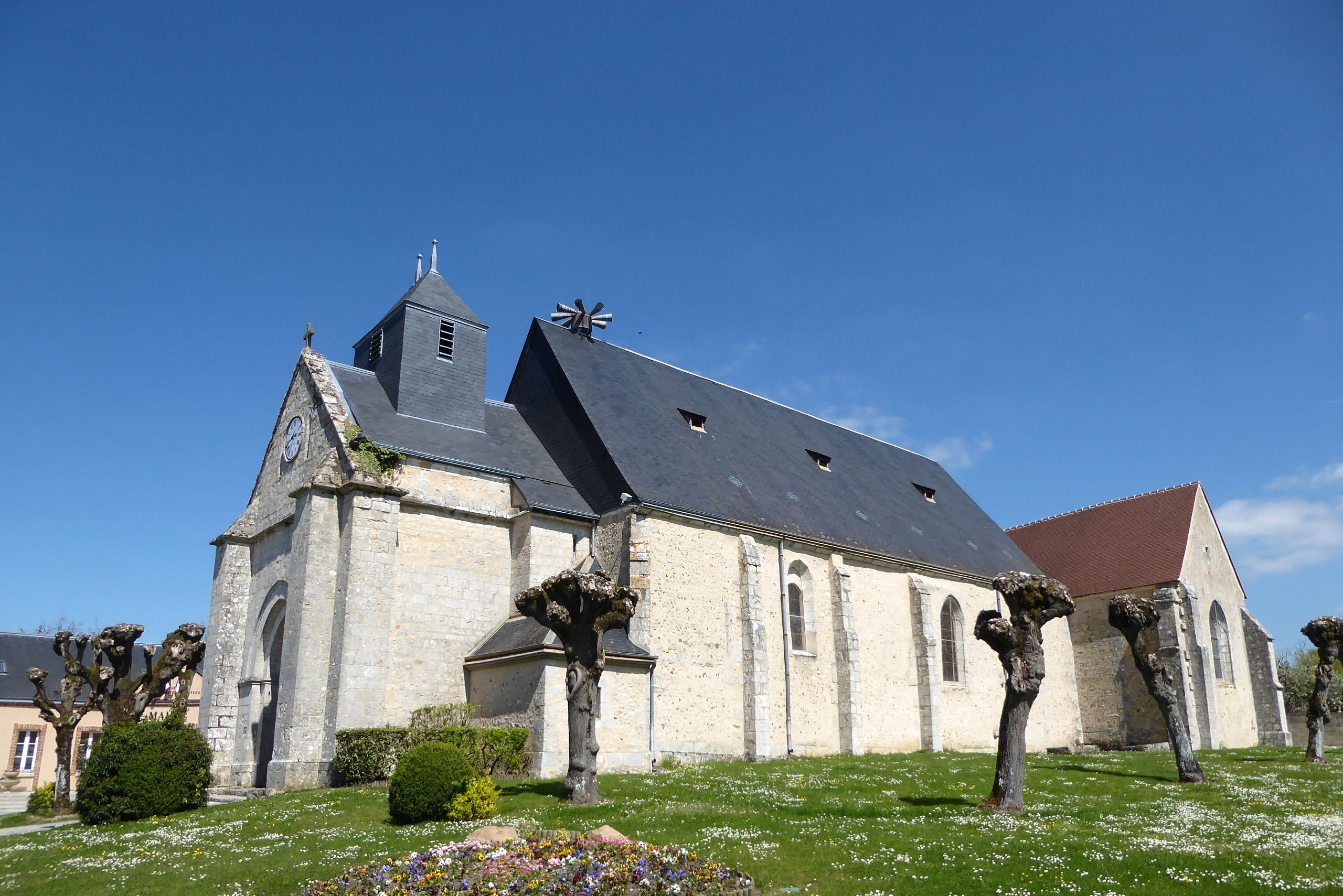 Église Saint-Pierre-et-Saint-Paul, Nogent-le-Phaie, Eure-et-Loir (France).